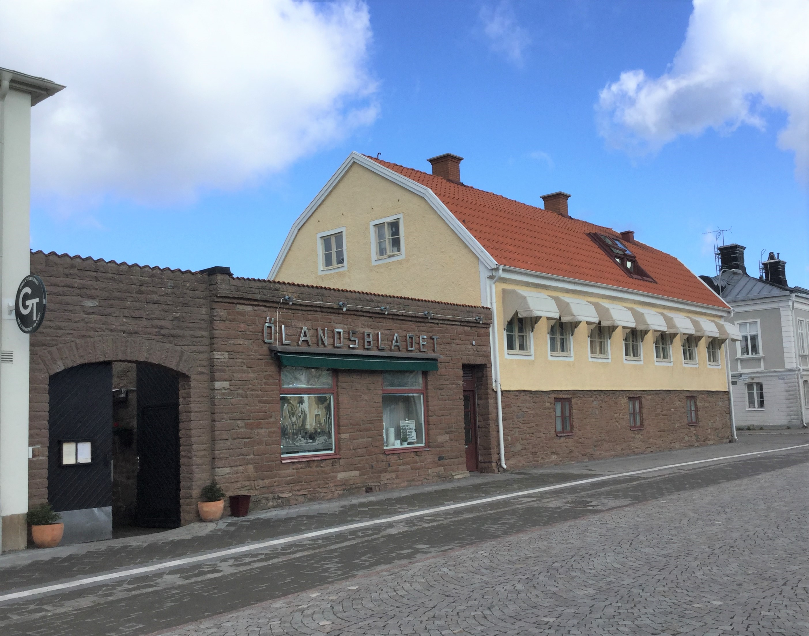 Ölandsbladets redaktion i gamla rektorsbostället i Borgholm, juni 2017. Byggnaden är från 1830-talets slut.